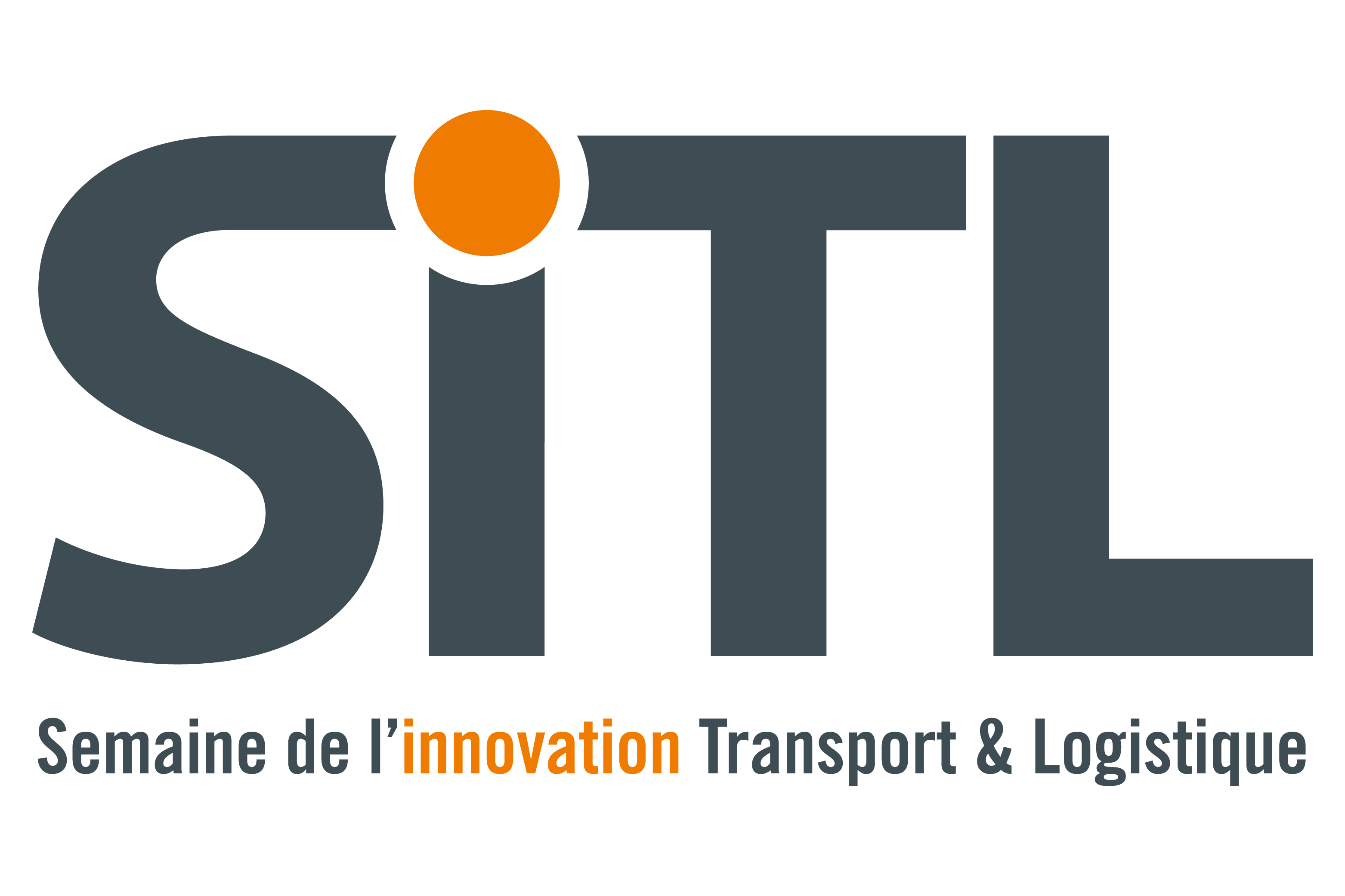 Logo SiTL 2019